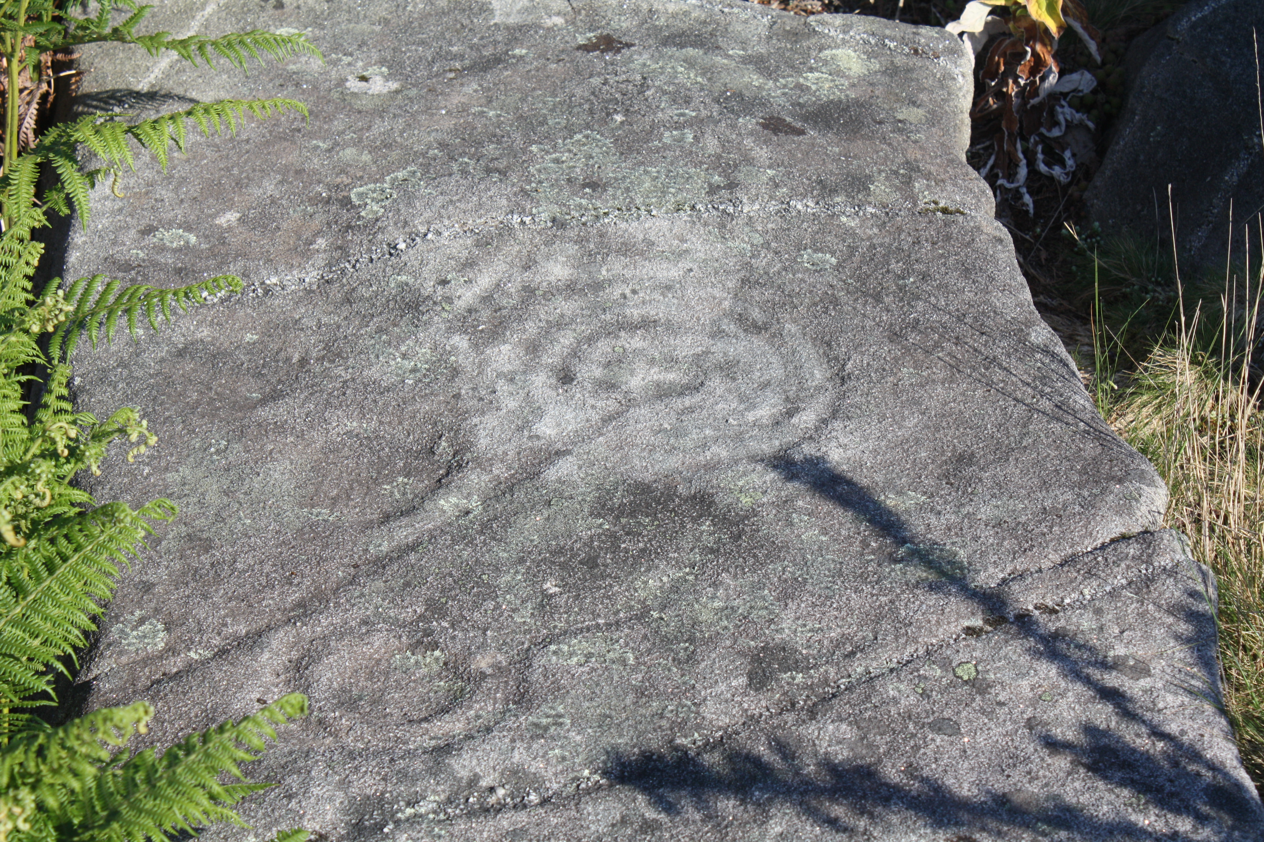 Petróglifos do Outeiro da Tartaruga (Samiera, Poio, Pontevedra)